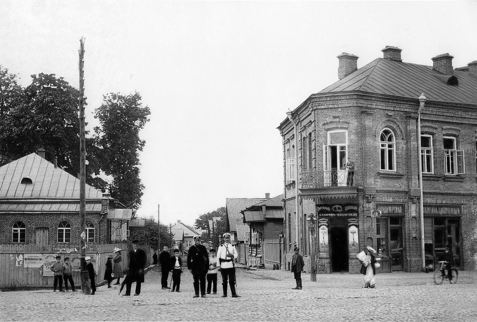 Магілёў. Вуліца Ледзькаўская з Дняпроўскага праспекта